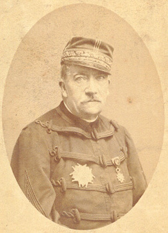 Général Jean-Baptiste Campenon